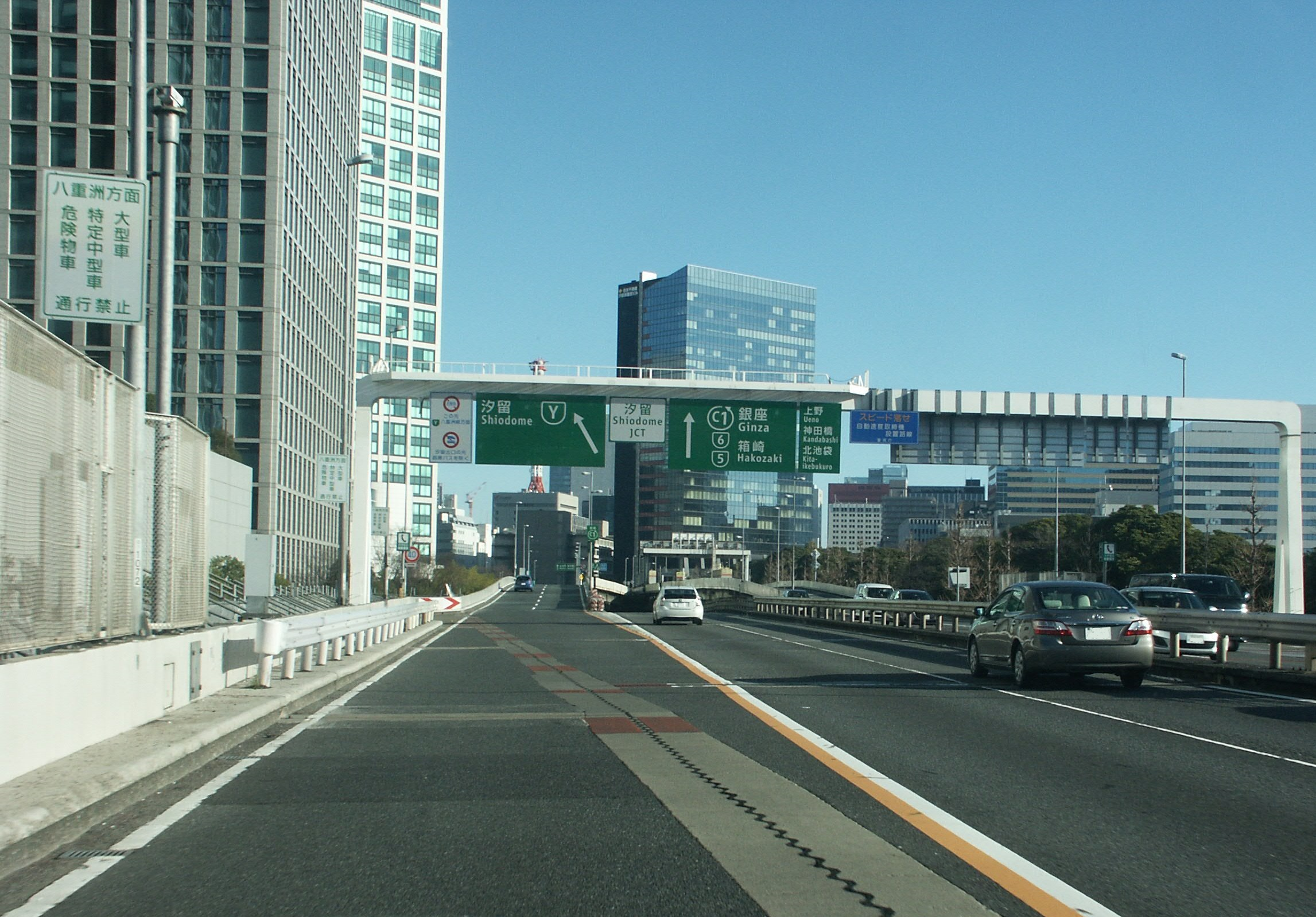 首都高速都心環状線汐留JCT分岐付近（内回り）